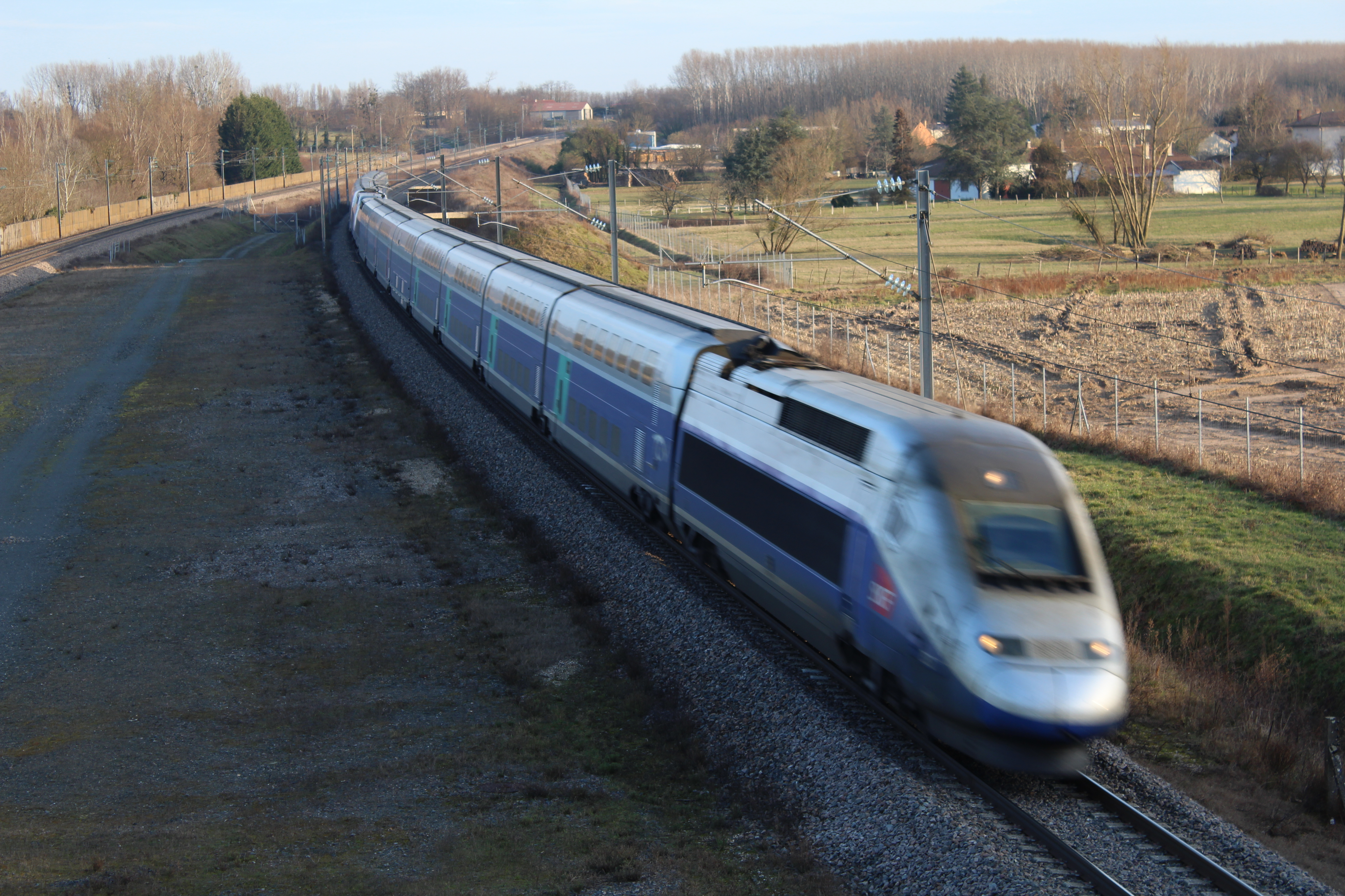 Ligne LGV Sud-Est à Grièges vers le pont empruntée par la route D51.